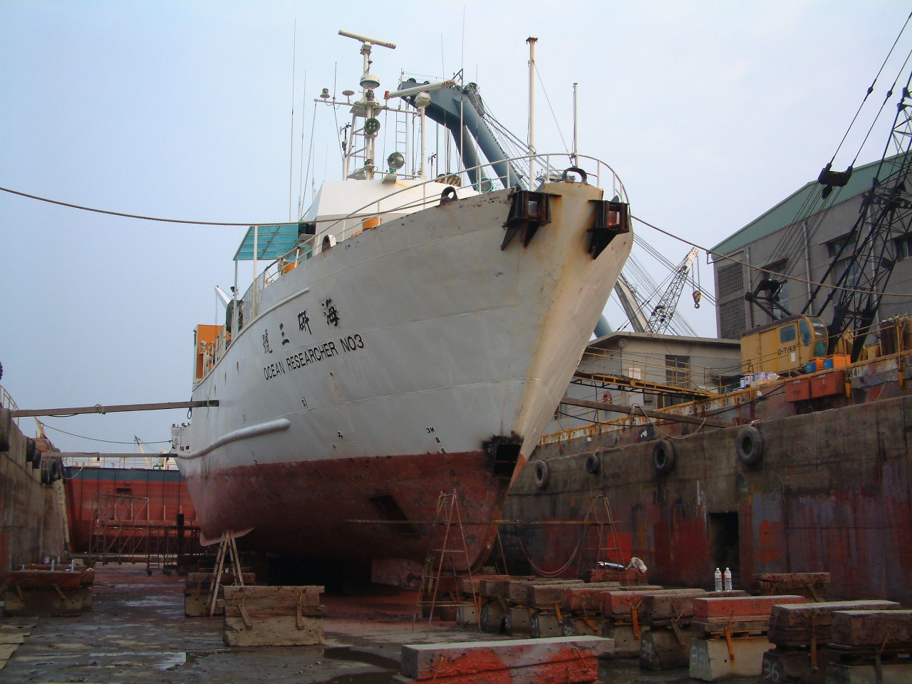 中文（台灣）: 海科院海研三號。